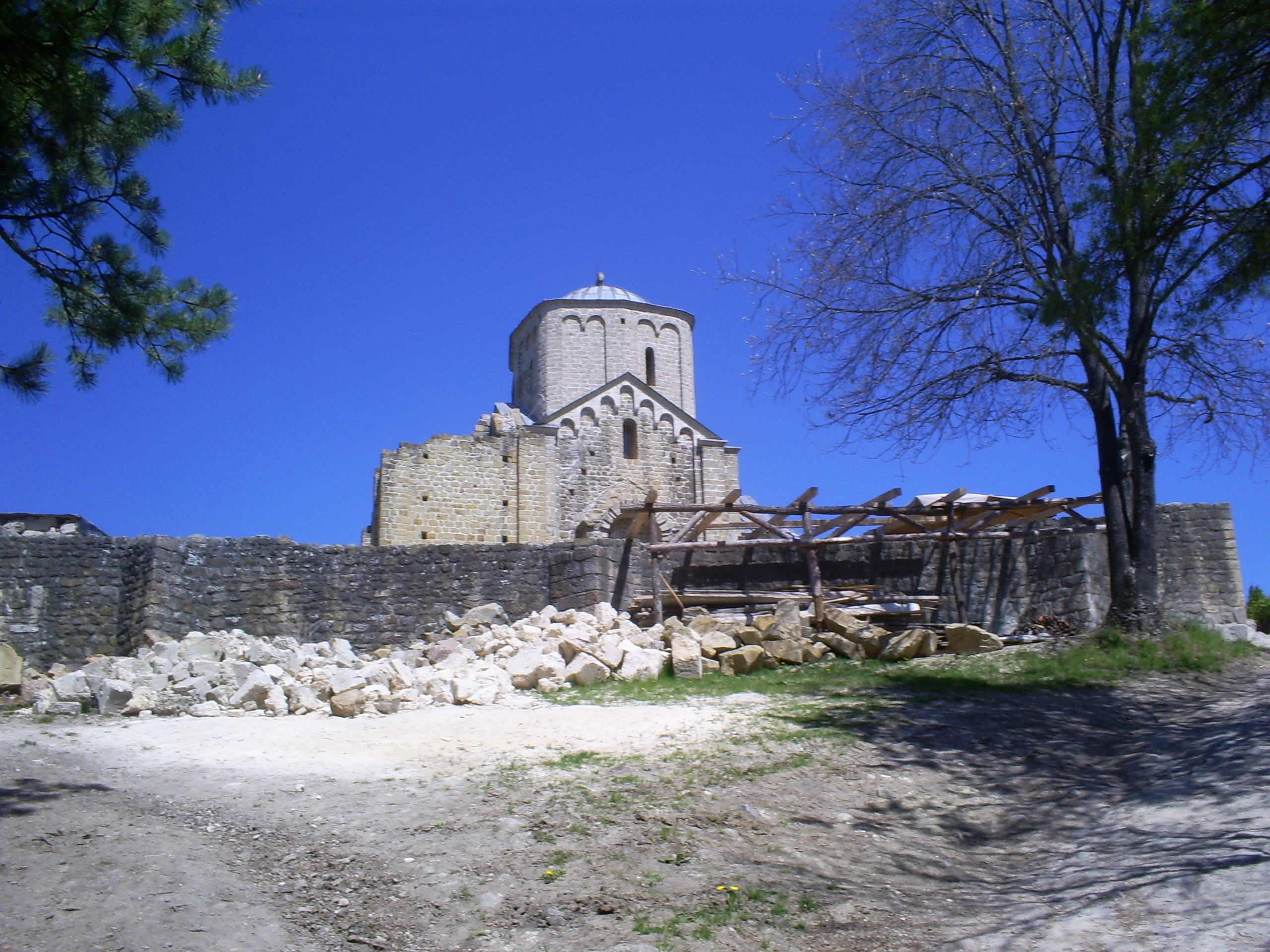 Manastir Djurdjevi stupovi